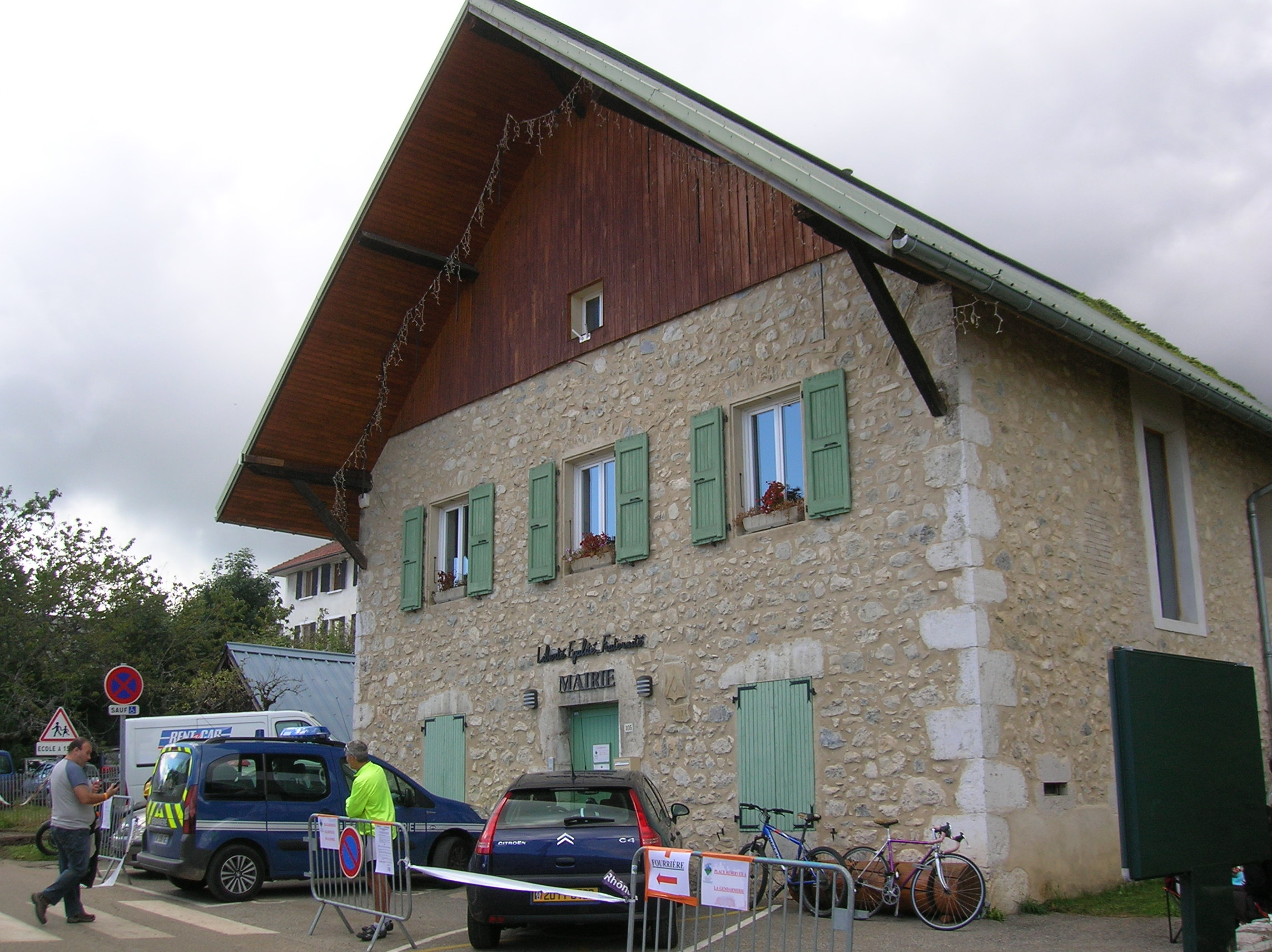 St Hilaire du Touvet, Isère, France. Coupe Icare 2015